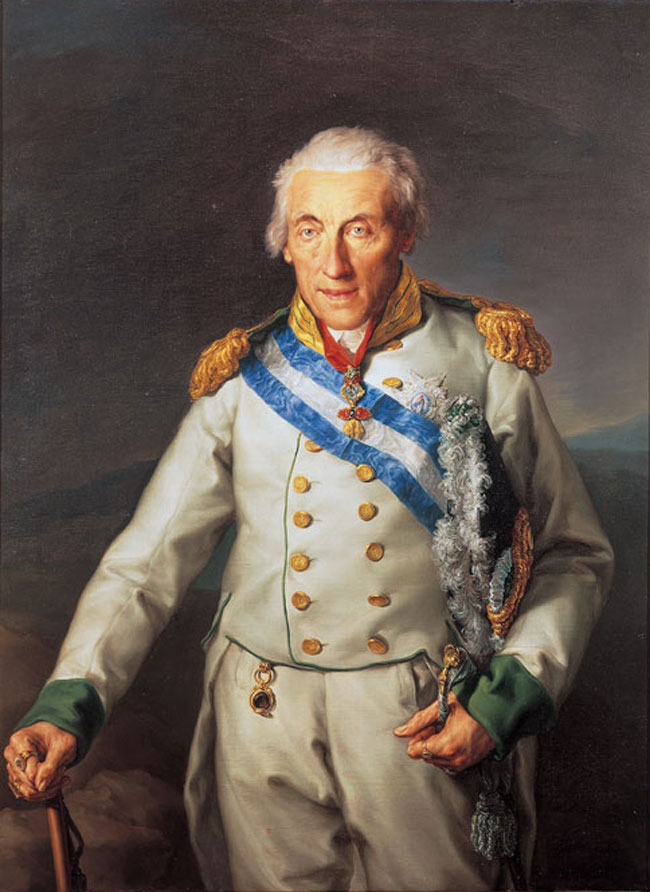 Retrato del príncipe Maximiliano de Sajonia (1759-1838).